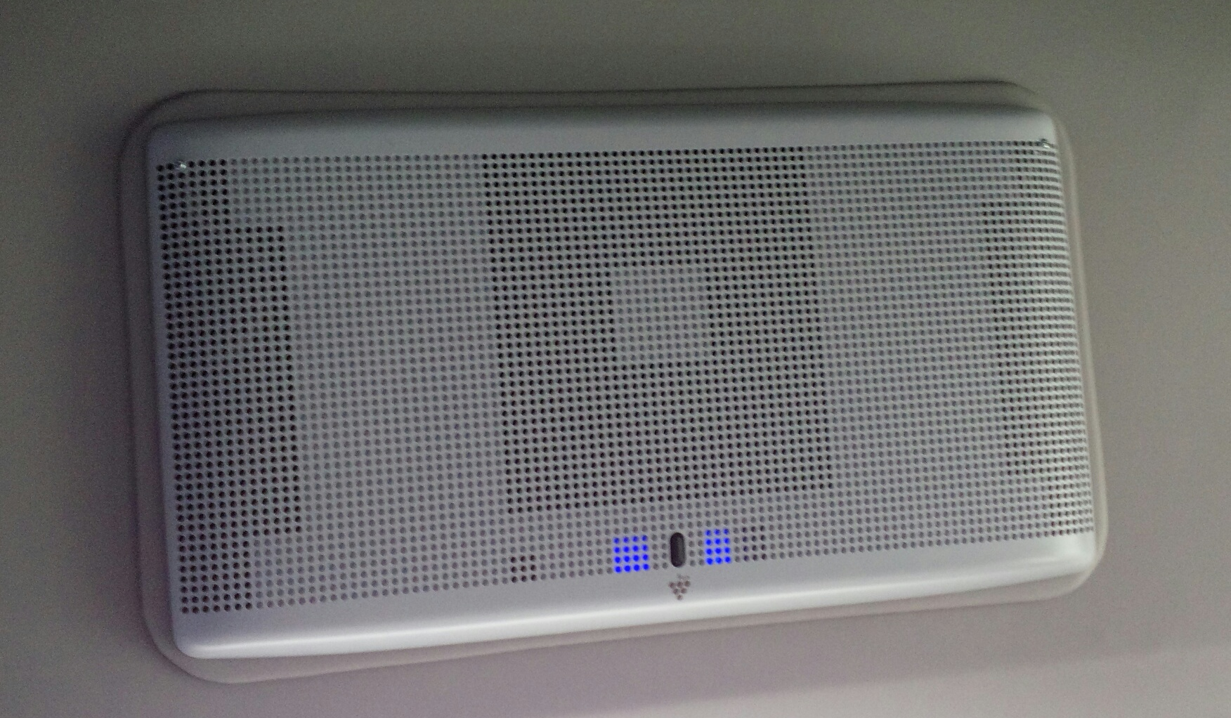 三菱ふそう・エアロエースで標準装備されているプラズマクラスターイオン発生器(デンソー製・天井に設置、本四海峡バス)